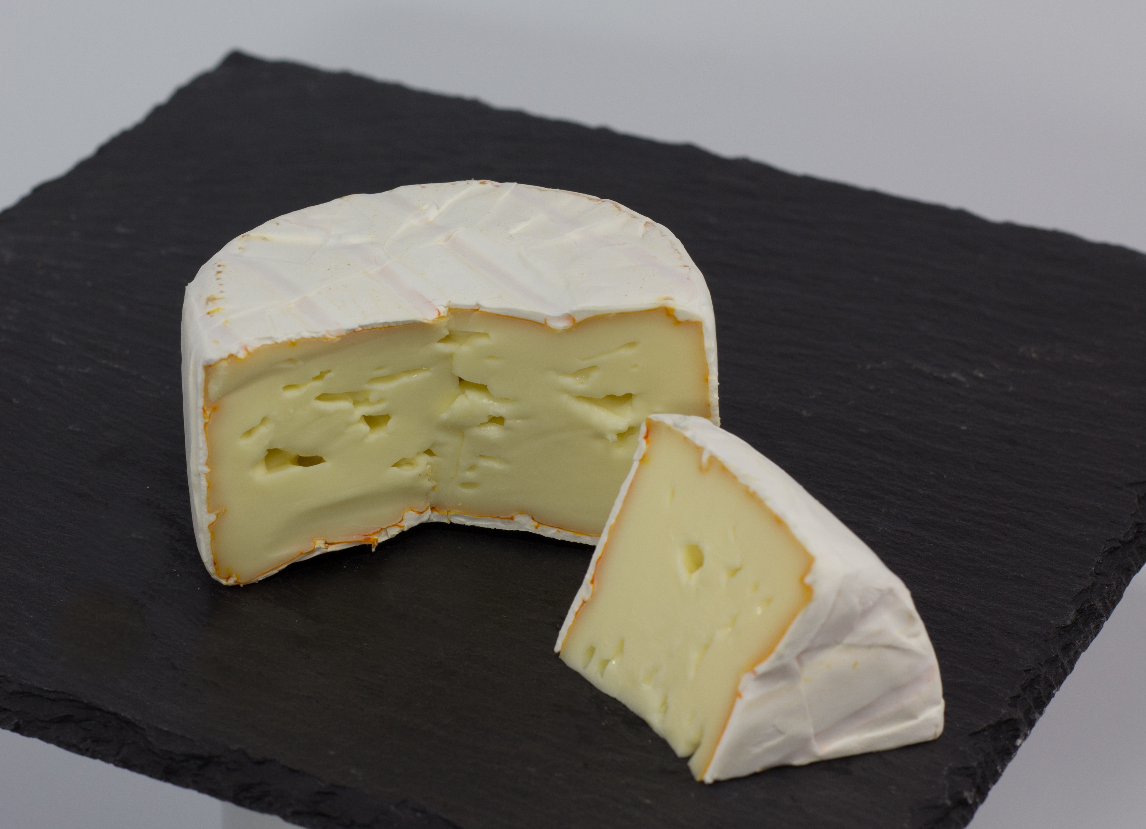 Bergader Almkäse cremig-würzig